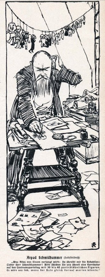 Selbstbildnis Arpad Schmidhammer, erschienen 1905, Heft 1, Seite 17 in der Zeitschrift JUGEND